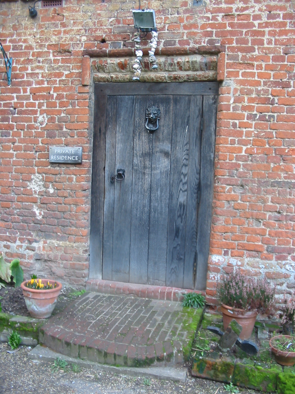 En stängd dörr.